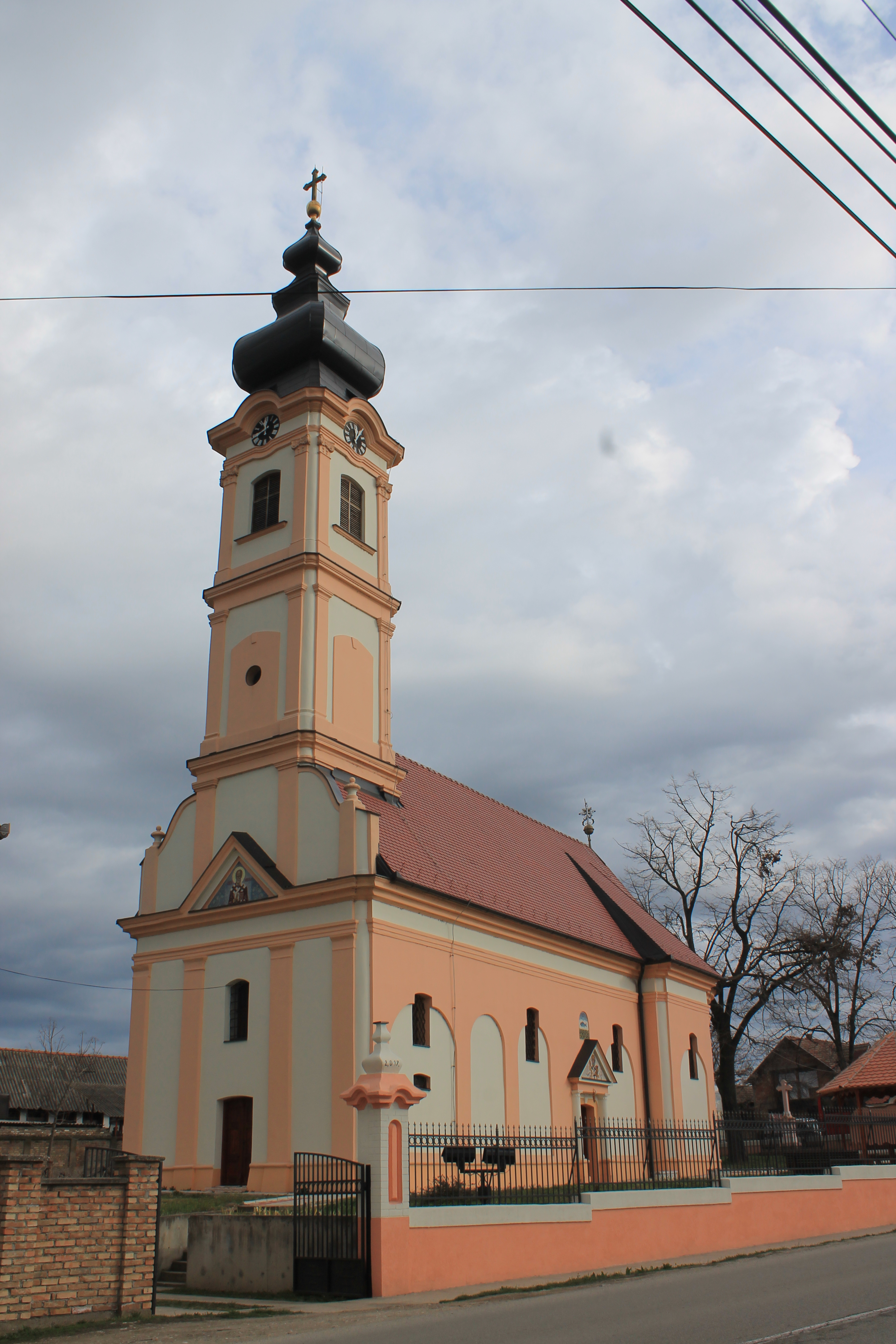 Crkva Svetog Nikole, Ruma